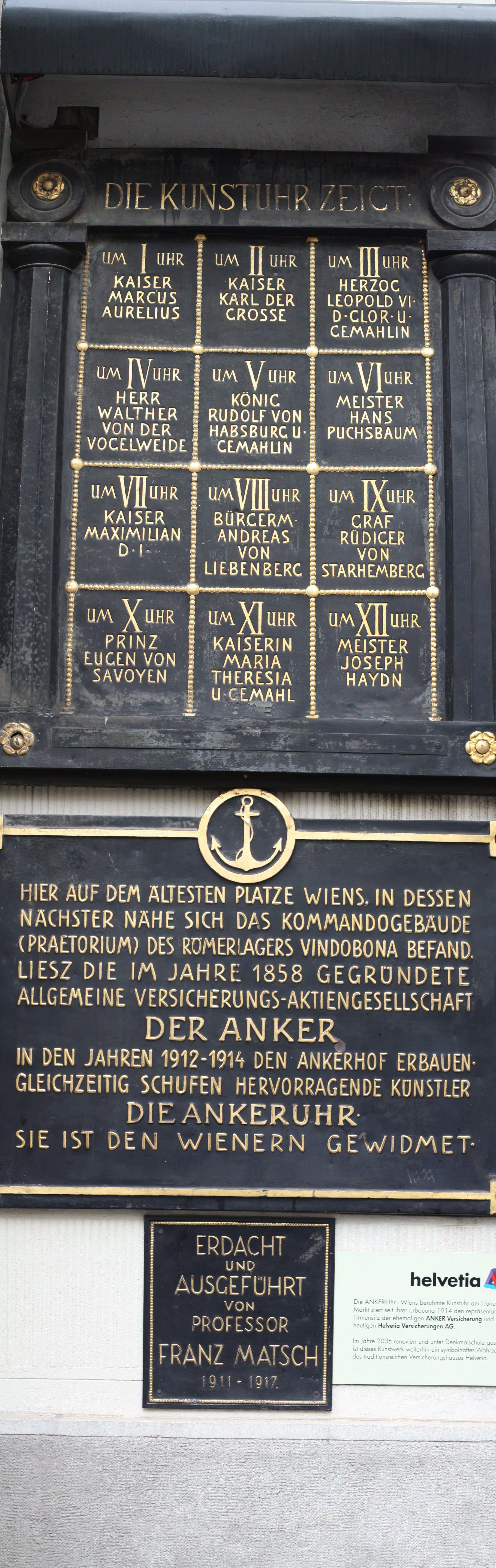 Ankeruhr, Wien, Vienna